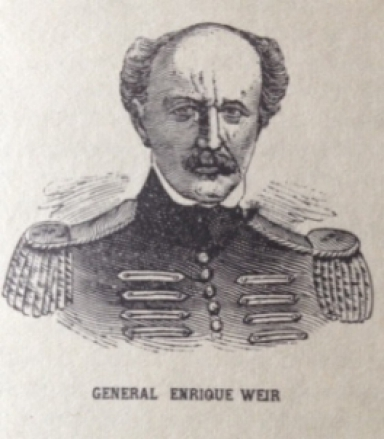 Grabado del General Enrique Weir, integrante de la Legión Británica que se unió a los ejércitos de Simón Bolívar durante la guerra de independencia de Venezuela. Fue dibujado por el editor Eduardo López Rivas y publicado en su revista "El Zulia ilustrado".